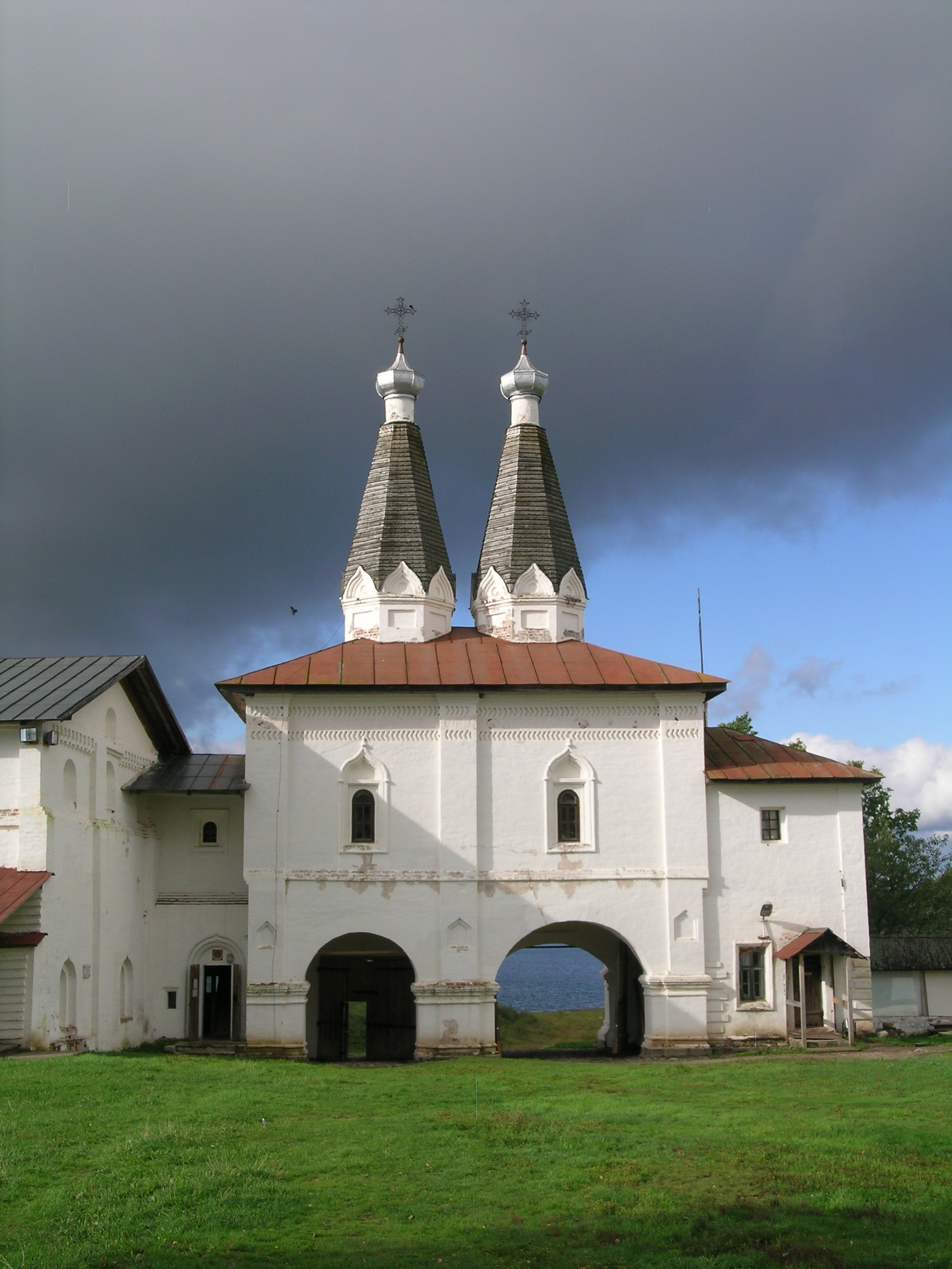 Святые ворота с церквами Богоявления и преподробного Ферапонта Белозерского (Вологодская область, Кириллов, село Ферапонтово)